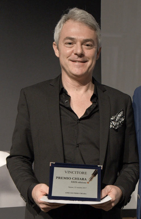 Davide Bregola, scrittore italiano